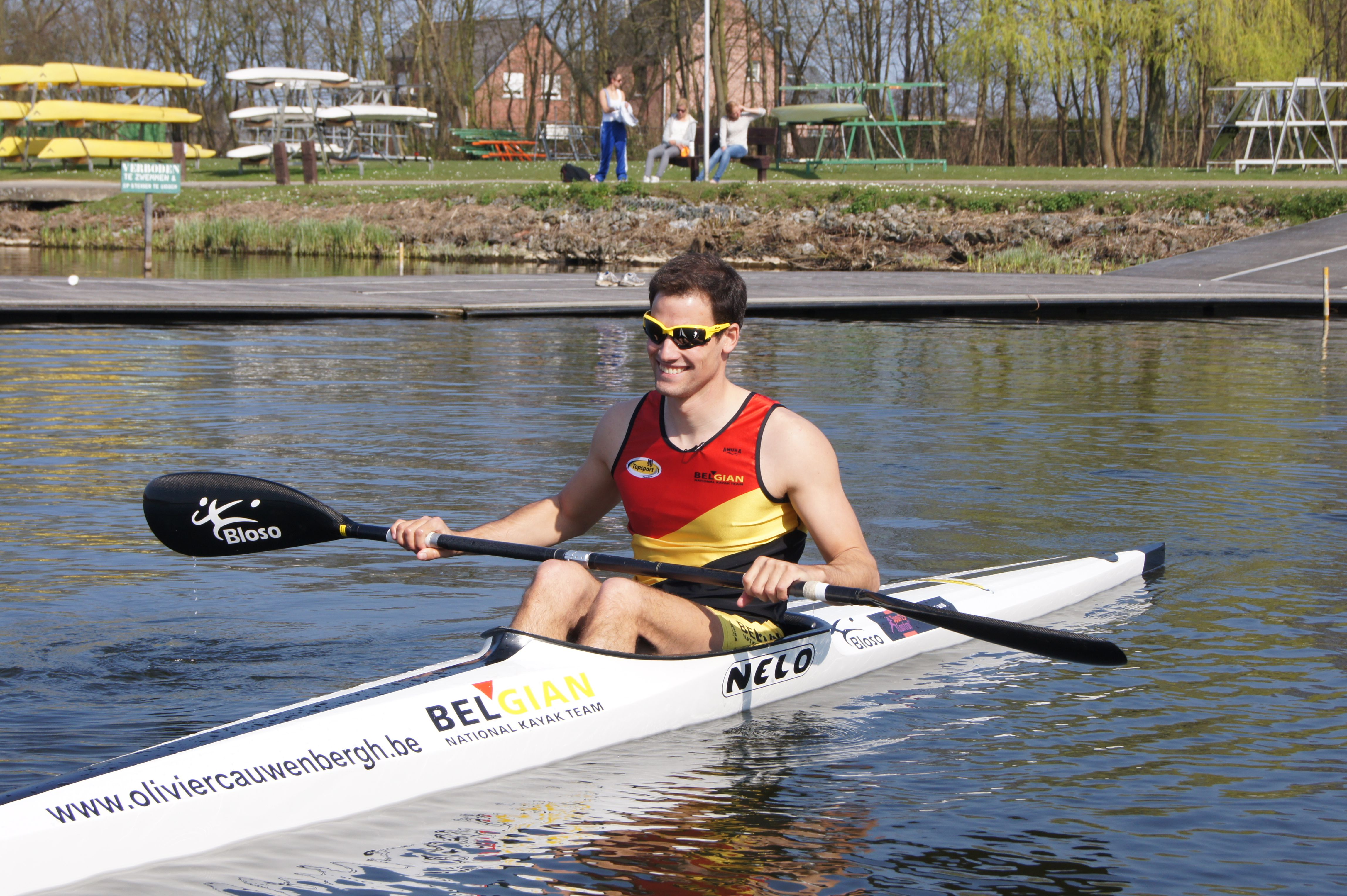 Olivier Cauwenbergh.Op het water bij de trainingsplaats Bloso Hazewinkel te Willebroek.